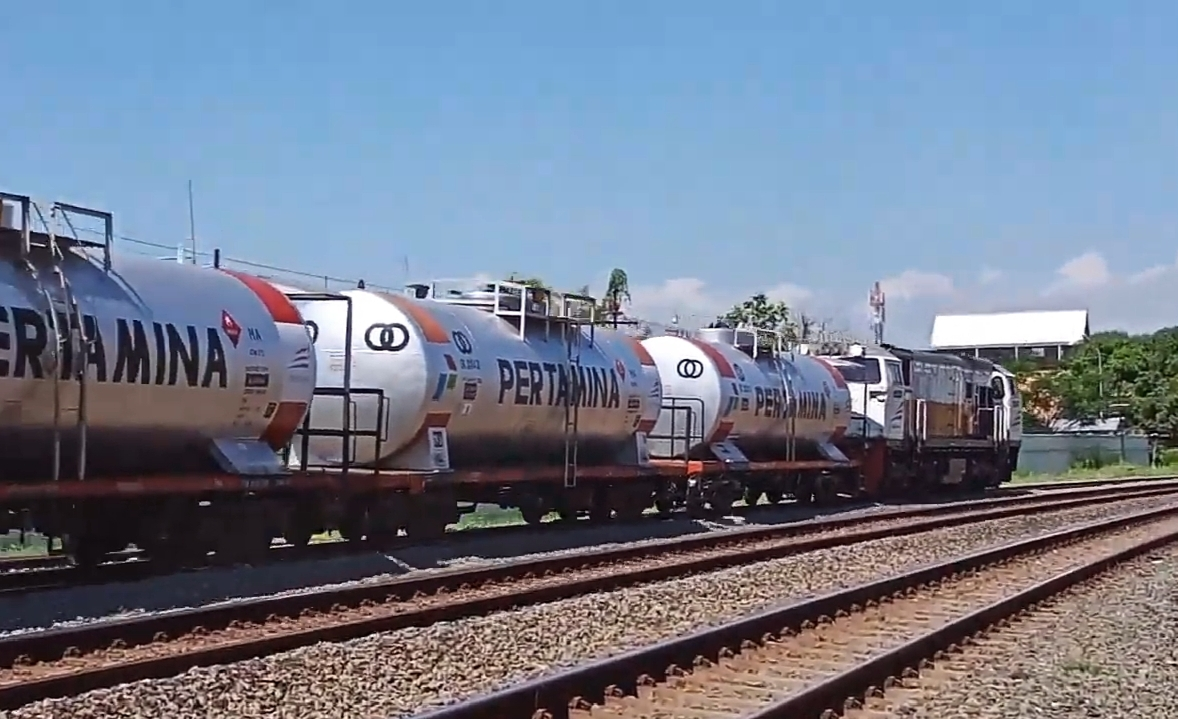 Kereta Api Ketel Pertamina melintas di dekat Stasiun Tegal, tepatnya di JPL 213